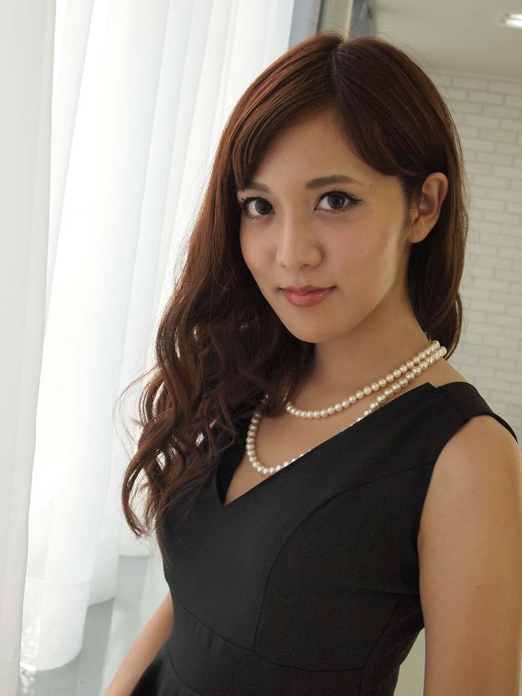 石川彩夏＠あやみぃ